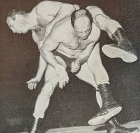 Red Lyons dans un programme de catch du 26 avril 1969